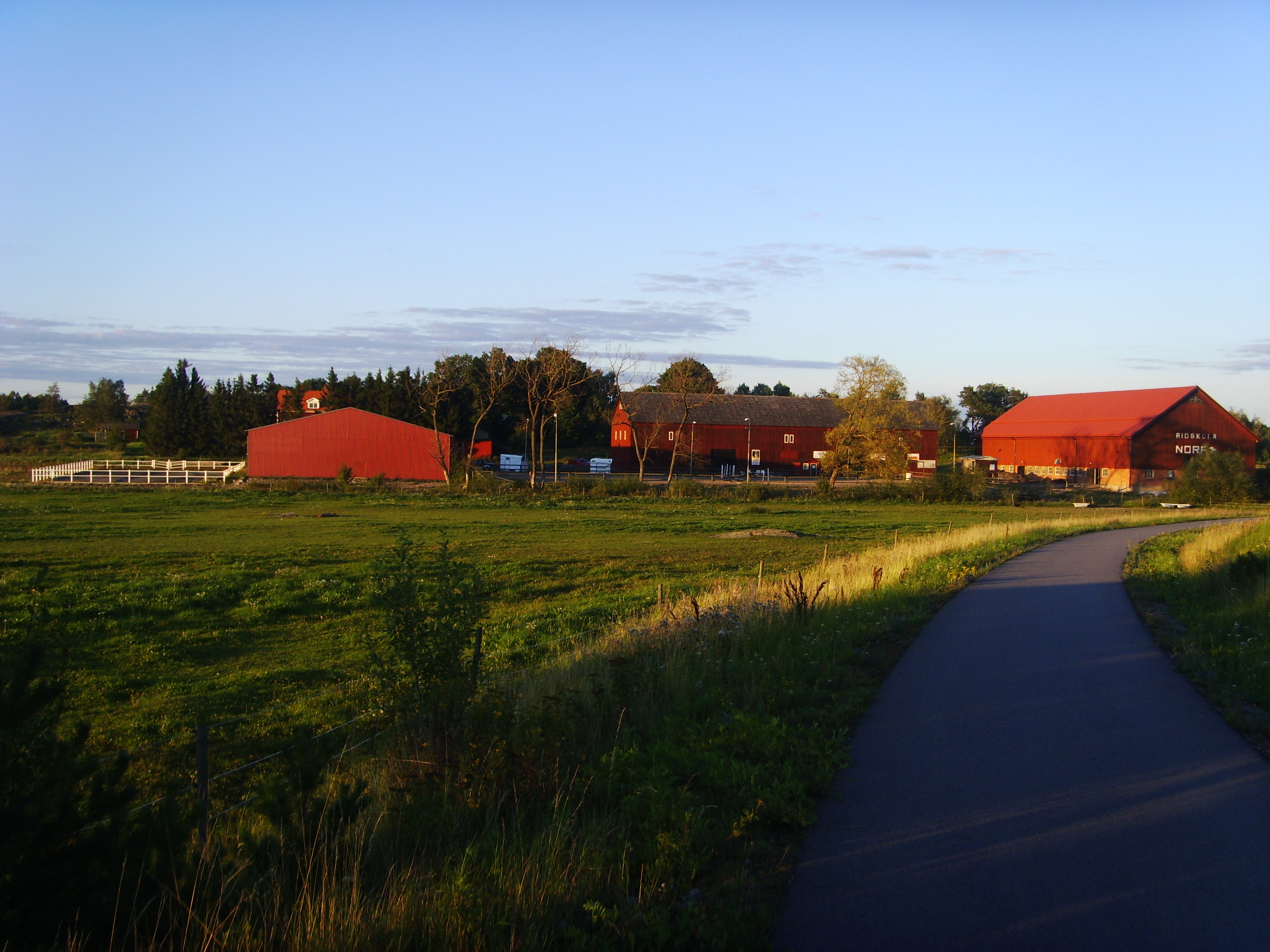 Norf, ridskola i Norrköpings södra utkant. Del av gamla Skälvs gård.